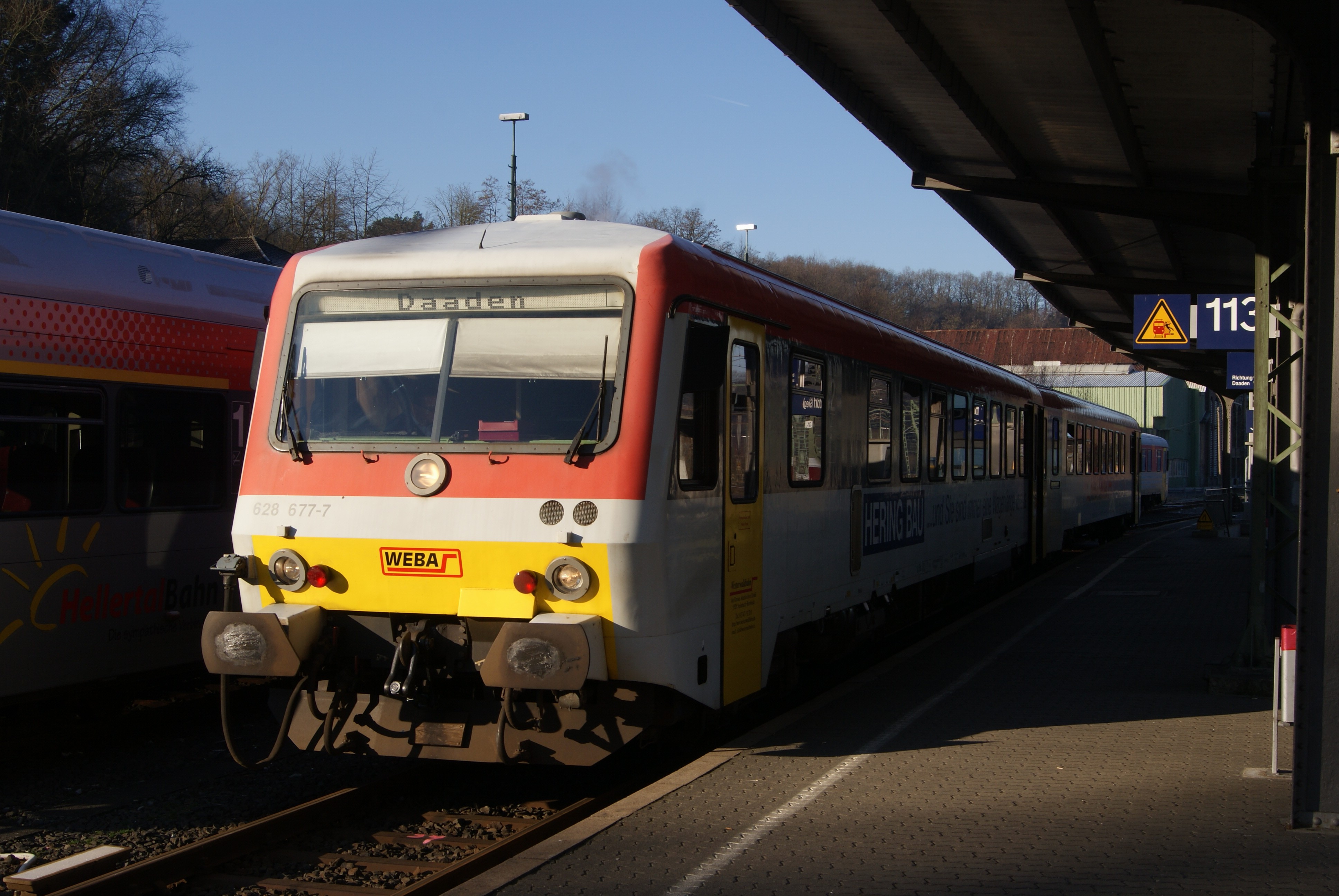 Der VT 628 (628 677) der kommunalen Westerwaldbahn im Einsatz auf der Daadetalbahn Betzdorf (Sieg) - Daaden, hier beim Aufenthalt im Bahnhof Endbahnhof Betzdorf (Sieg)